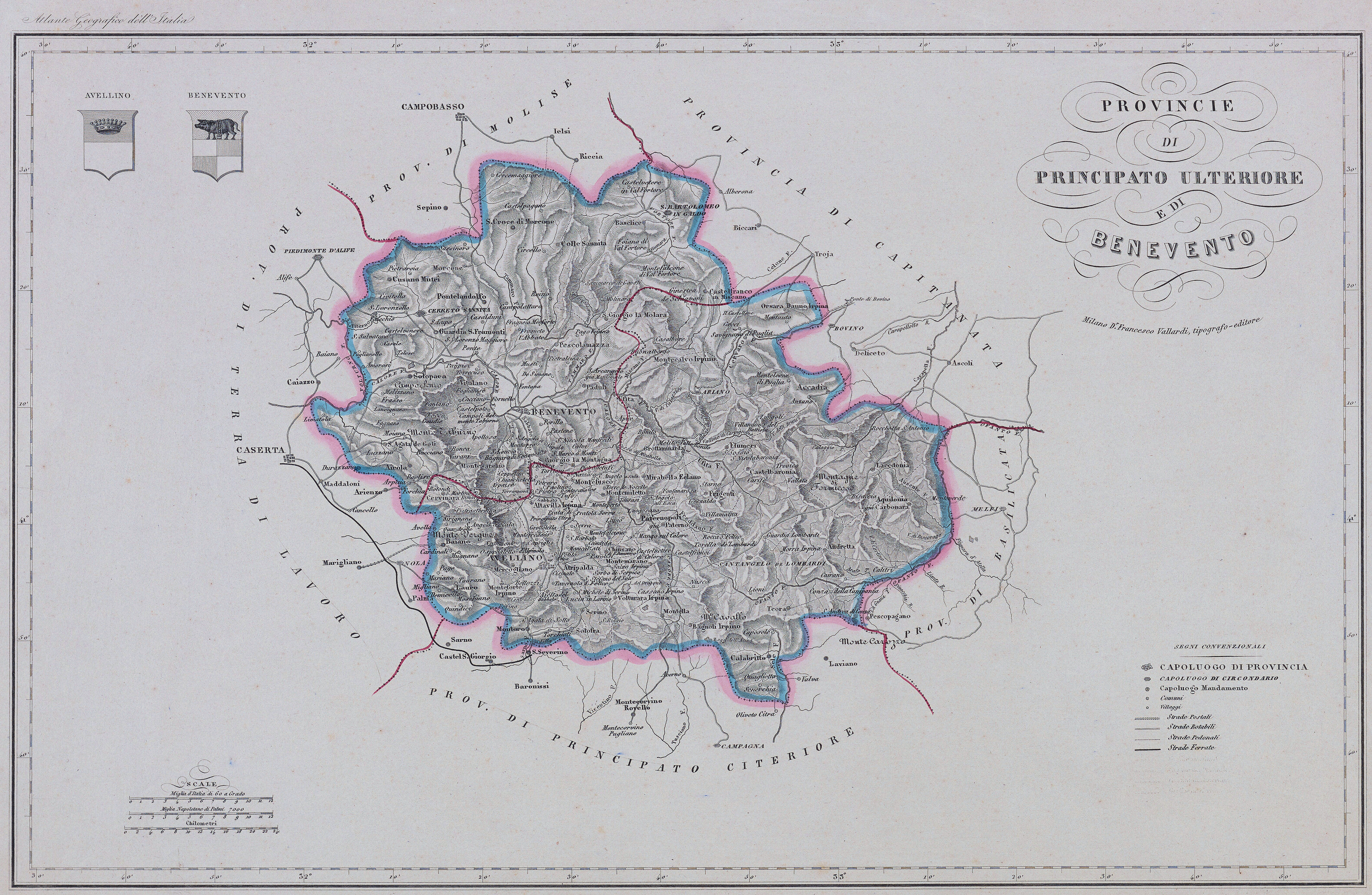 Province di Avellino e di Benevento